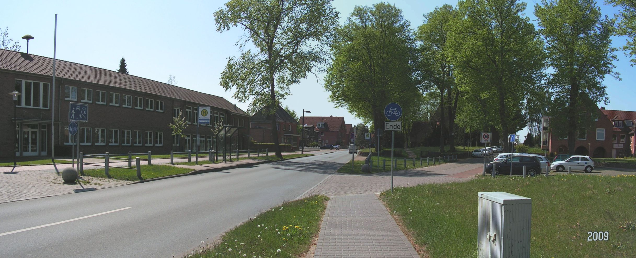 Alt-Rensefeld